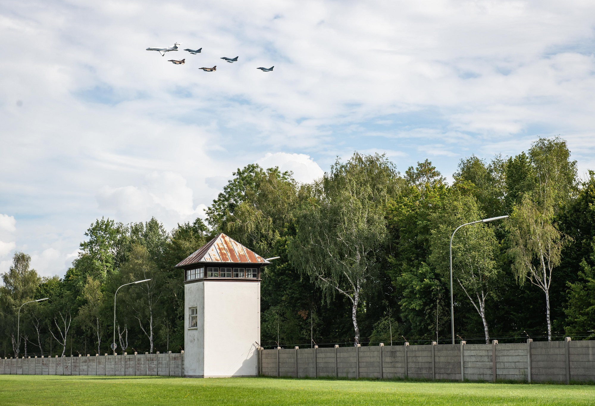 היום (שלישי), התקיים כחלק מתרגיל חיל האוויר בגרמניה, מטס "זיכרון לעתיד" - מטס הצדעה משותף בהובלת מפקד חיל האוויר, אלוף עמיקם נורקין, בליווי מפקדת טייסת הטיסה הראשונה בחיל-האוויר הישראלי, מפקדת טייסת "הנחשון", סגן-אלוף ג', ולצד מפקד חיל האוויר הגרמני, לוטננט גנרל אינגו גרהארץ.